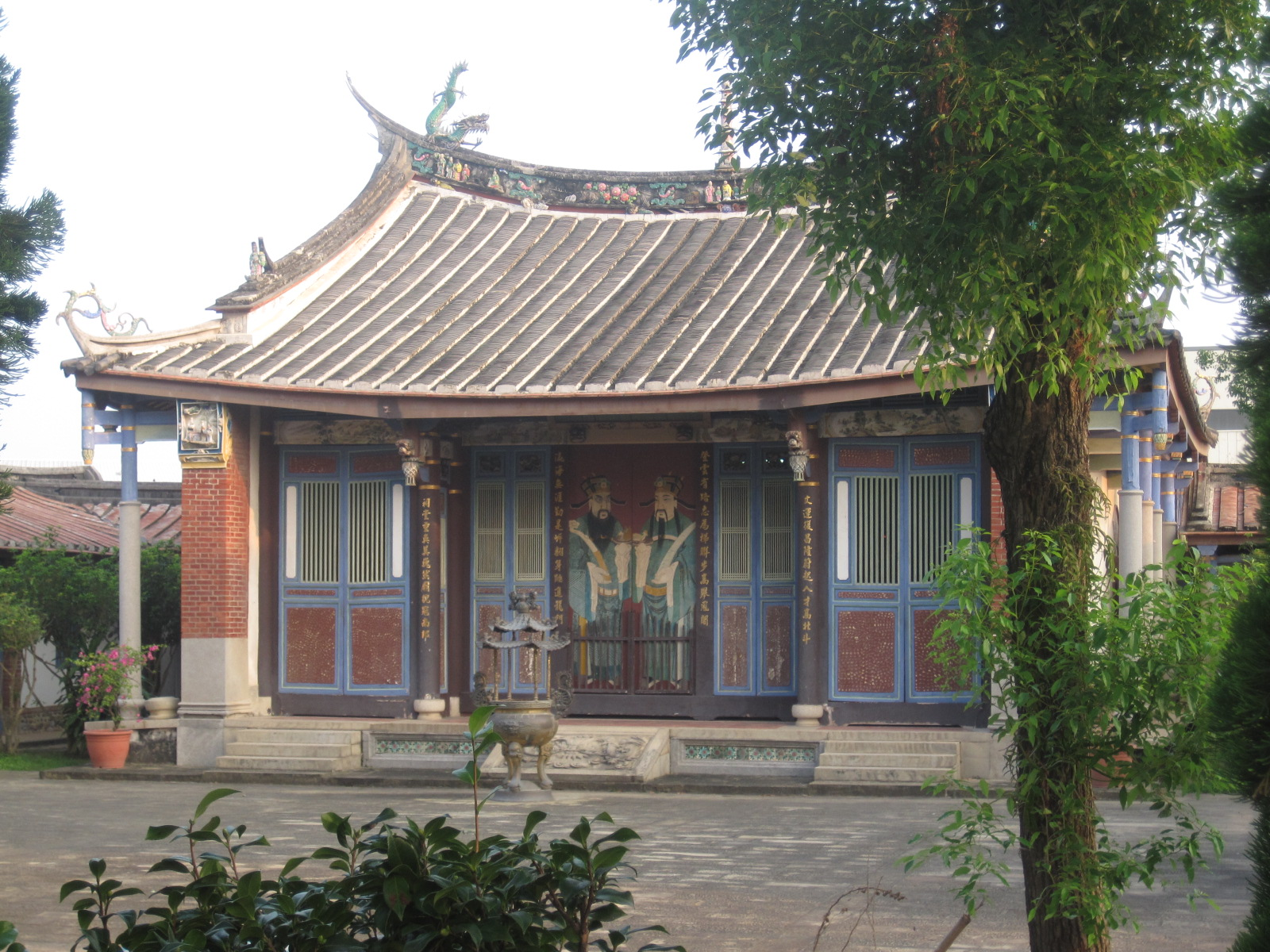 南投草屯的登瀛書院